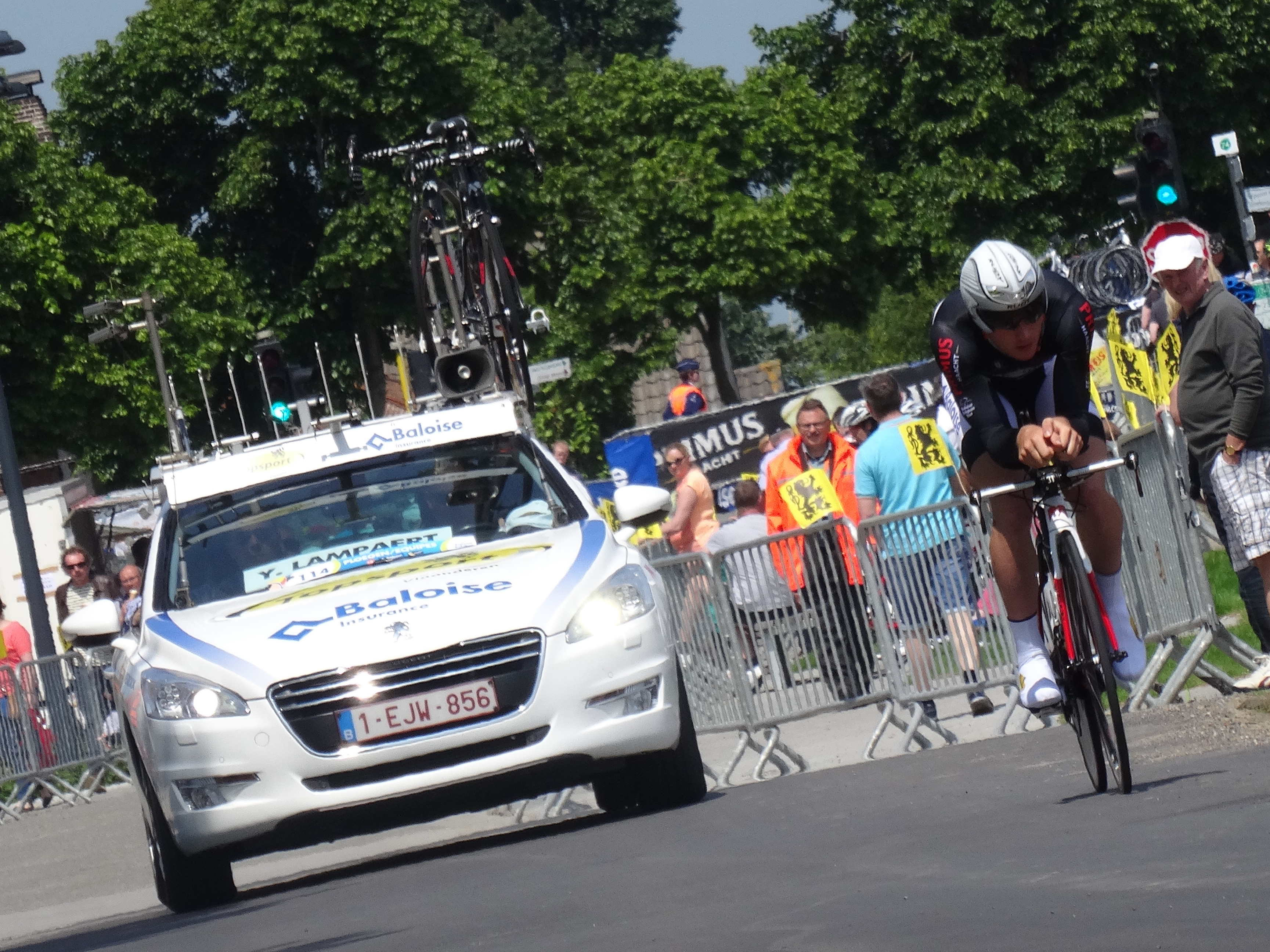 Reportage photographique réalisé le vendredi 30 mai à l'occasion du contre-la-montre individuel de la troisième étape du Tour de Belgique 2014 à Dixmude, Belgique.